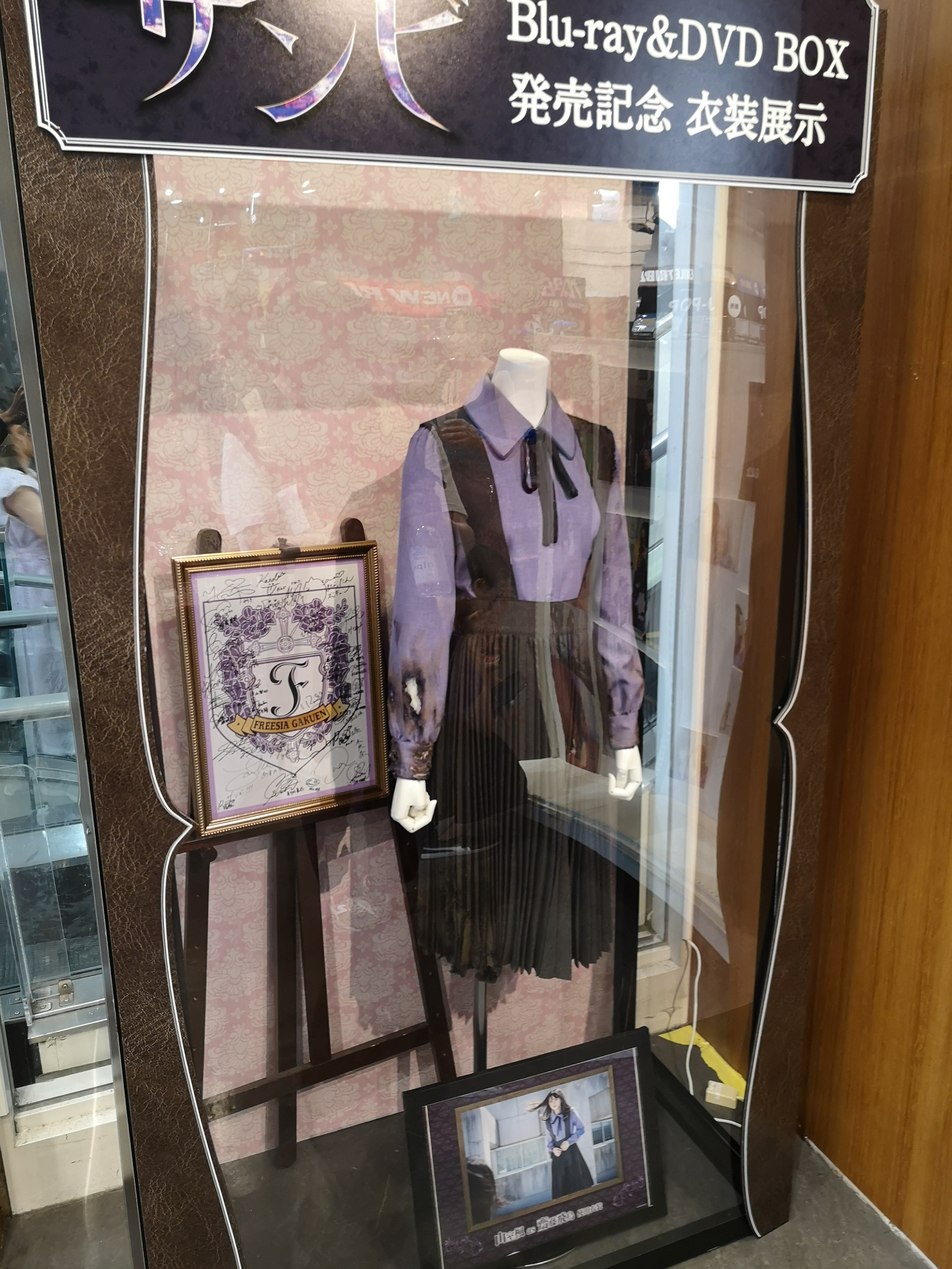 此为在涩谷Tsutaya书店二楼进行展示的，电视剧《残美》中饰演山室枫的斋藤飞鸟使用的衣装。